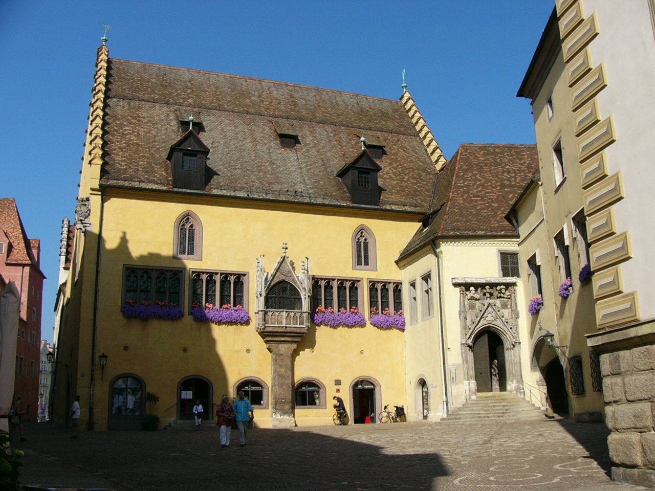 Altes Rathaus, Saal des Immerwährenden Reichstages